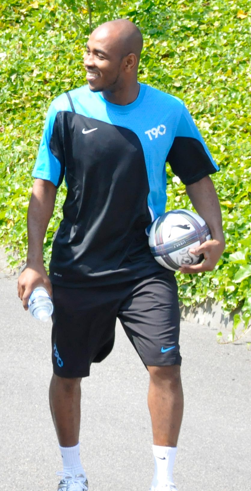 Kandia Traore à l'entrainement